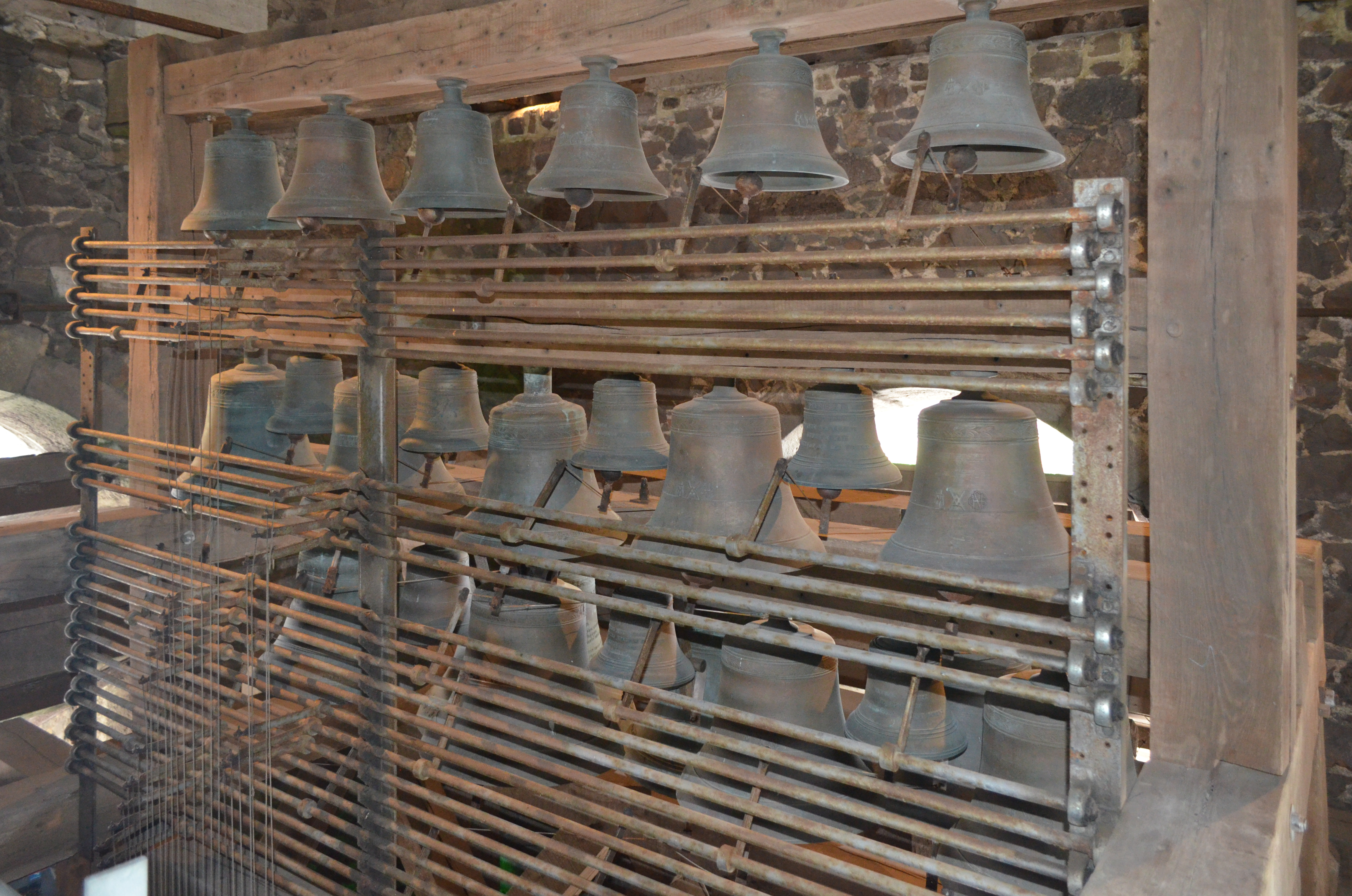 Thuin (Belgique) - Intérieur du Beffroi.